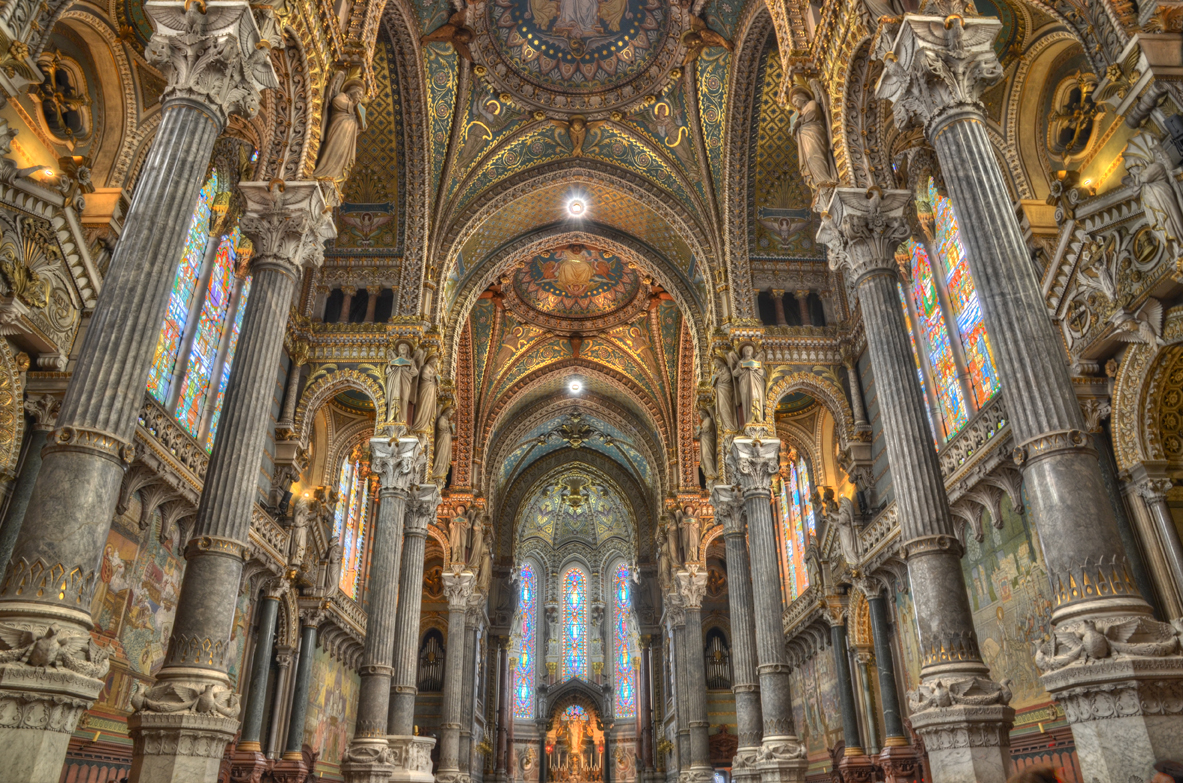 Vue intérieure de la basilique Notre Dame de Fourvière, Lyon